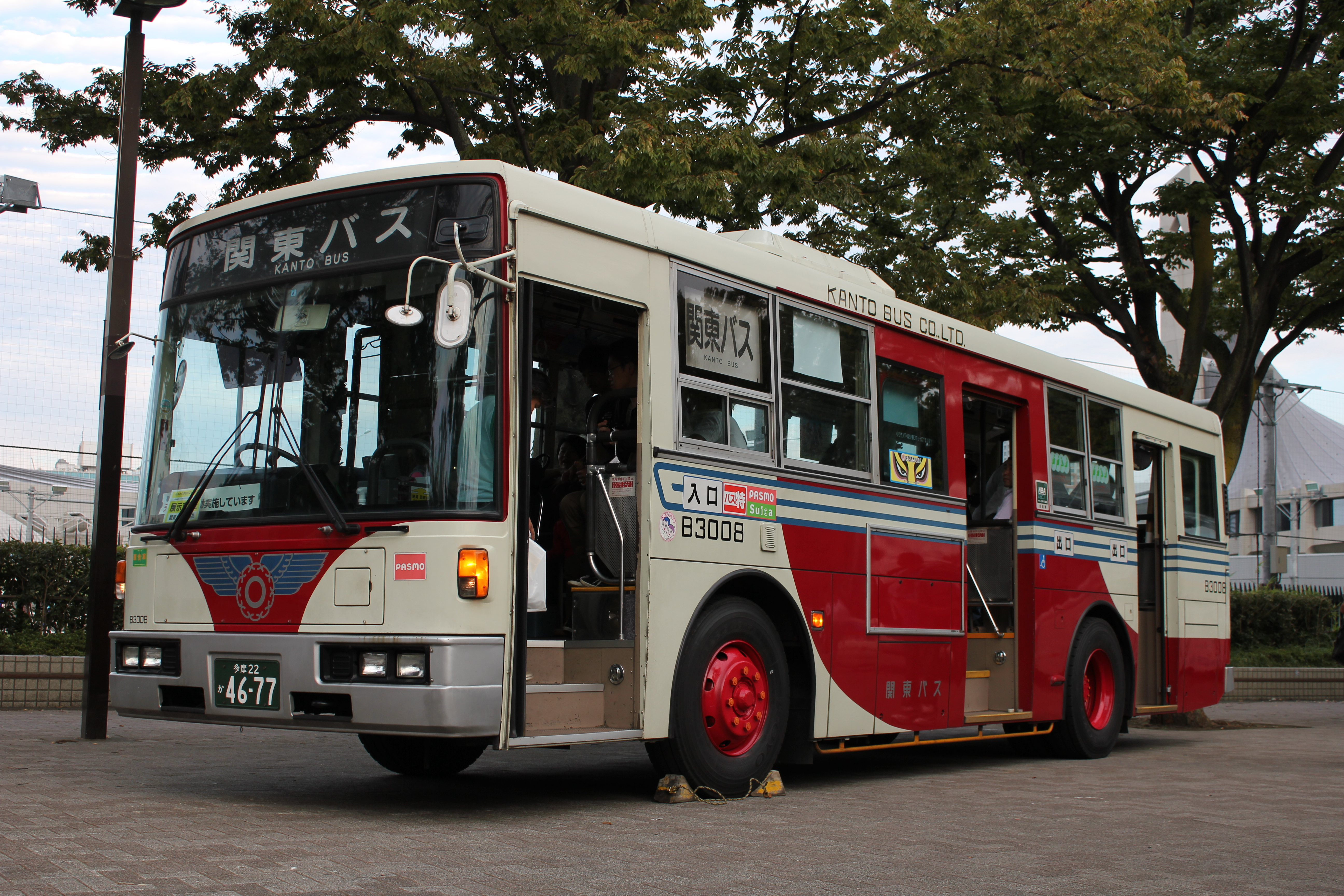 バスフェスタ2012にて撮影